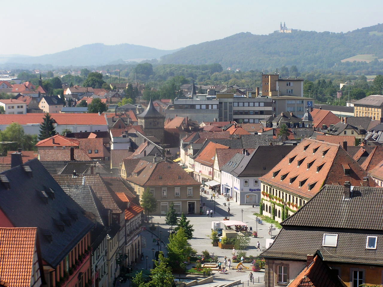 Blick auf Lichtenfels vom Oberen Torturm